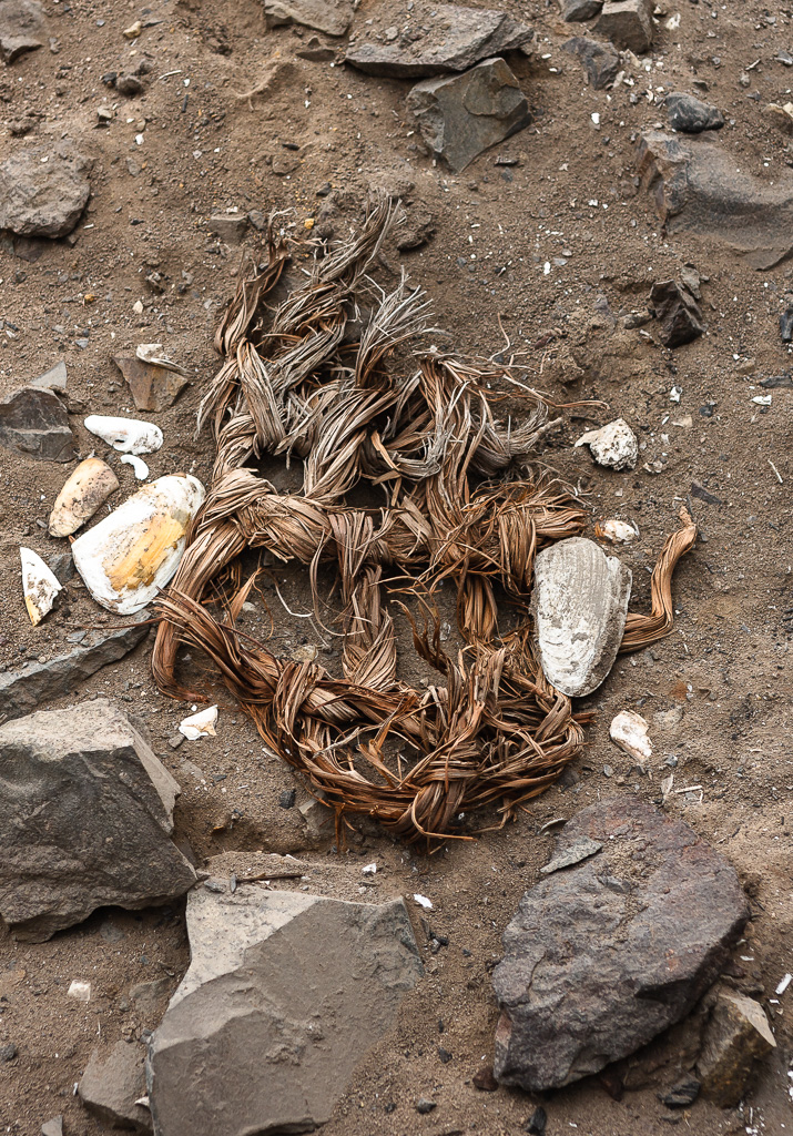 Sogas de amarre para los muros